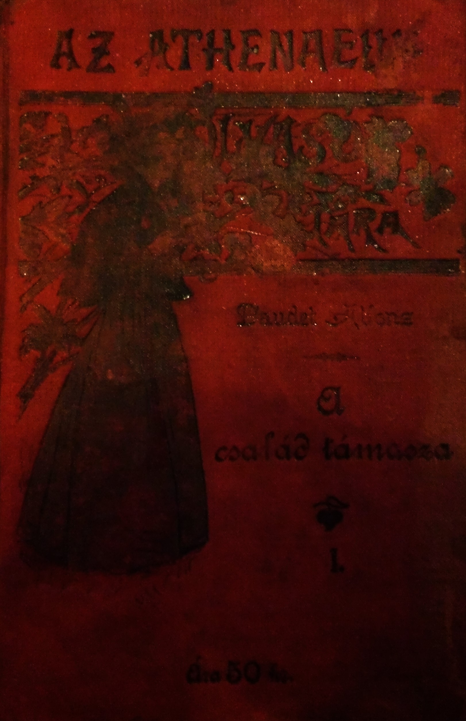 Alphonse Daudet: A család támasza, 1890-es évek